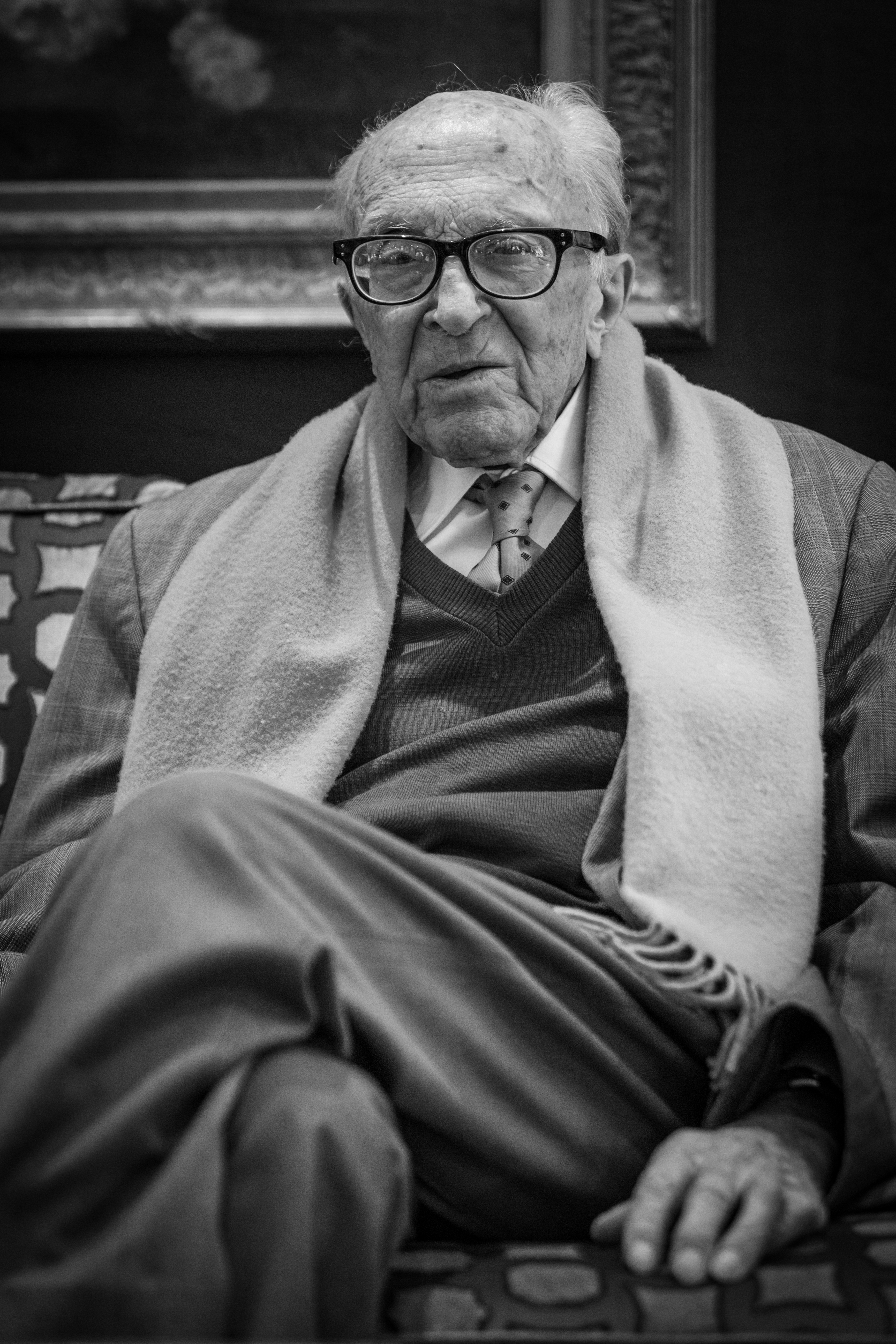 Boris Pahor, né le 26 août 1913 à Trieste, est un écrivain slovène.